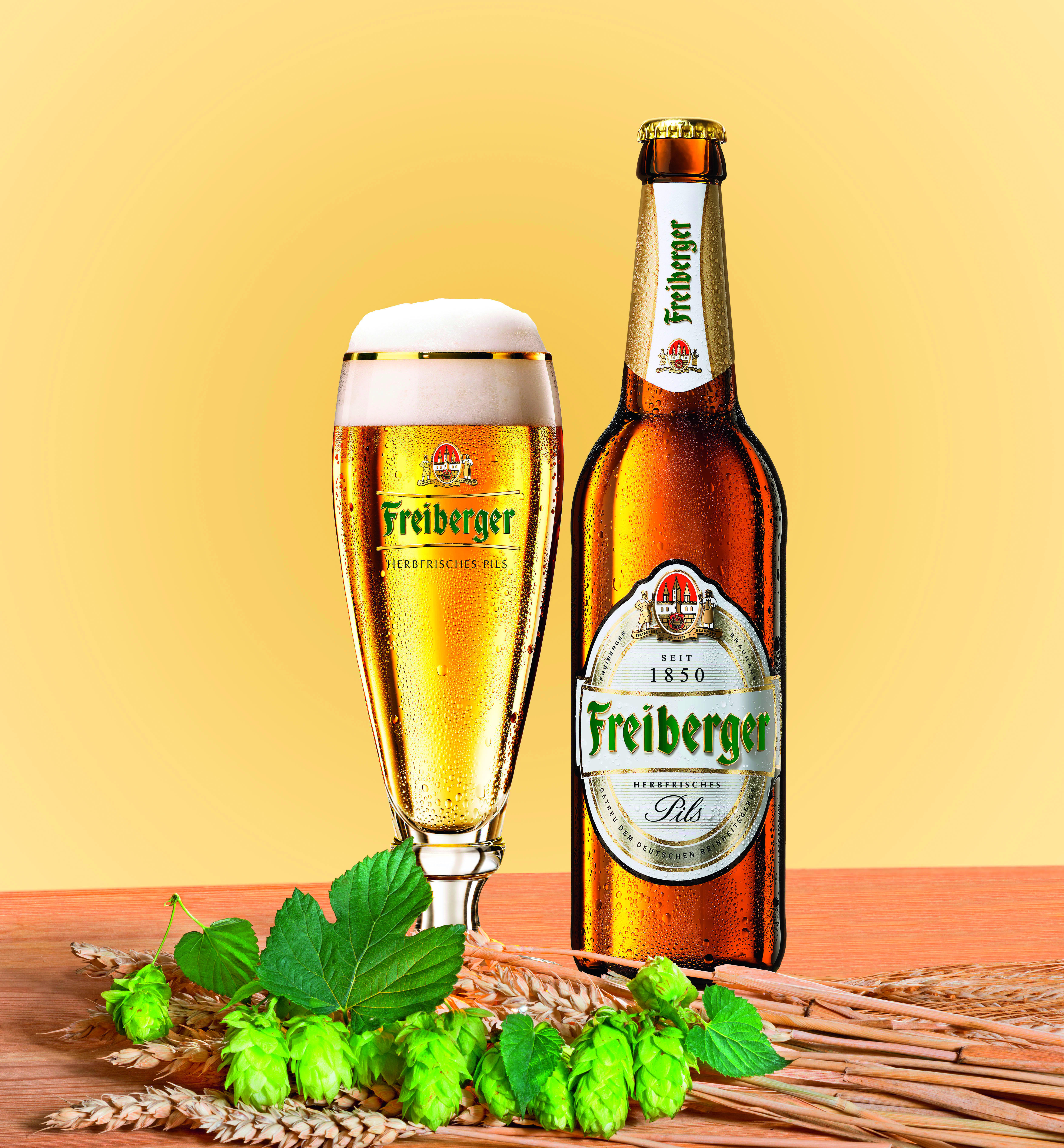 Freiberger Pils ist ein kräftiges Bier.